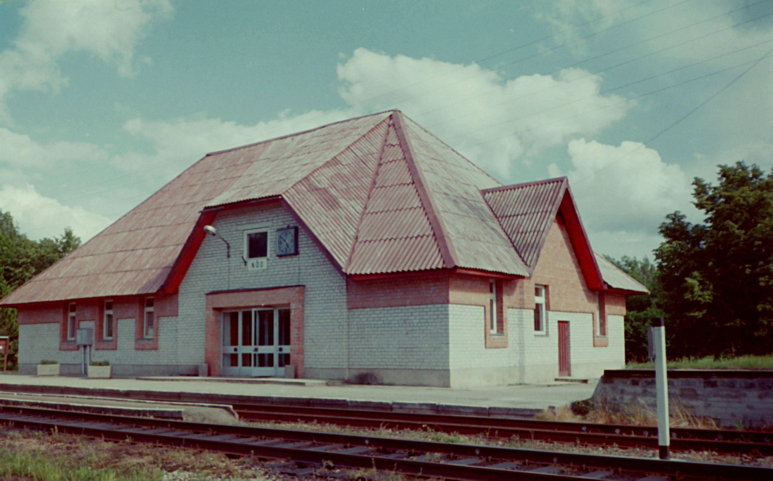 Nõo jaamahoone